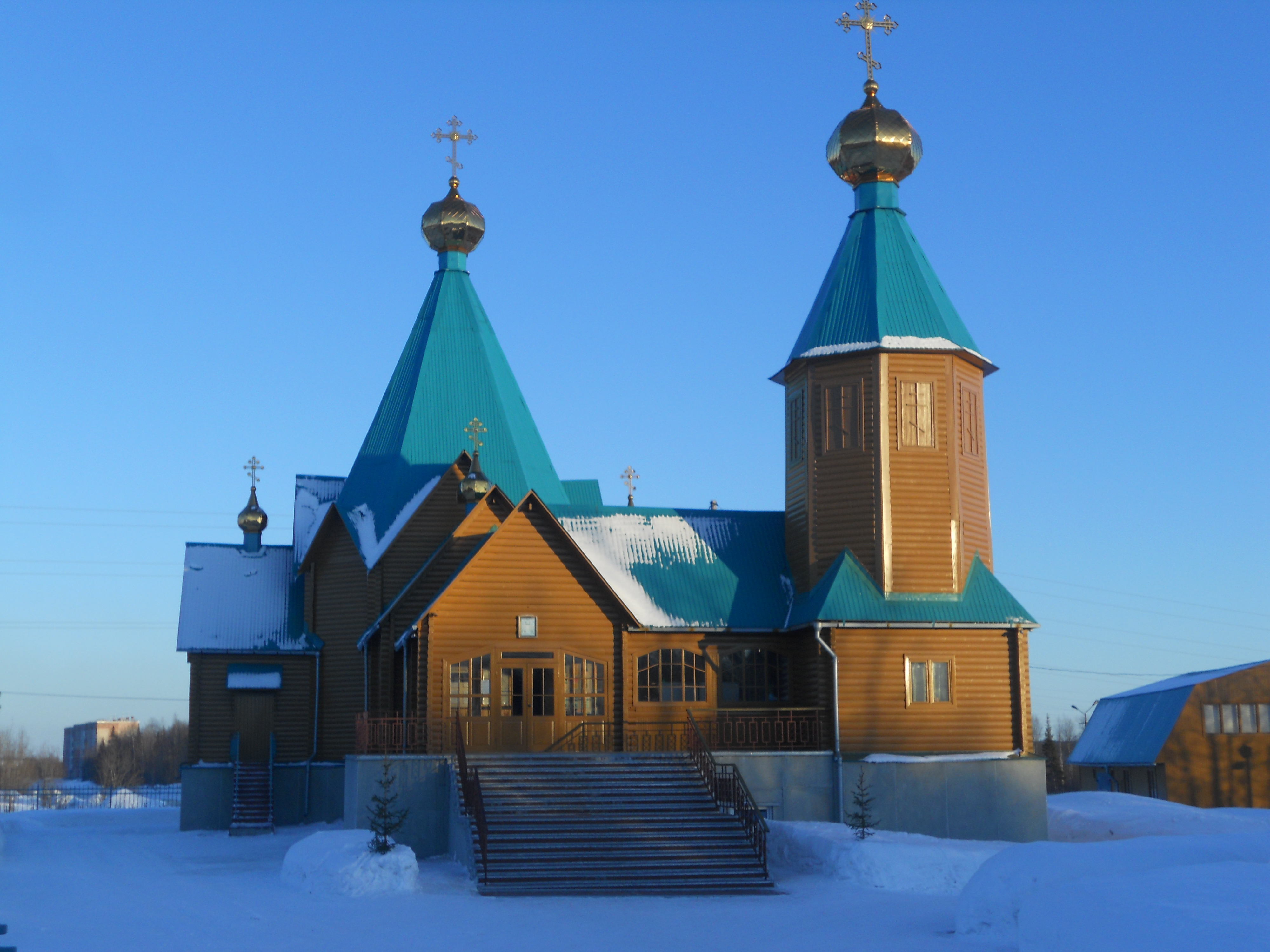 Храм Новомучеников и Исповедников Российских